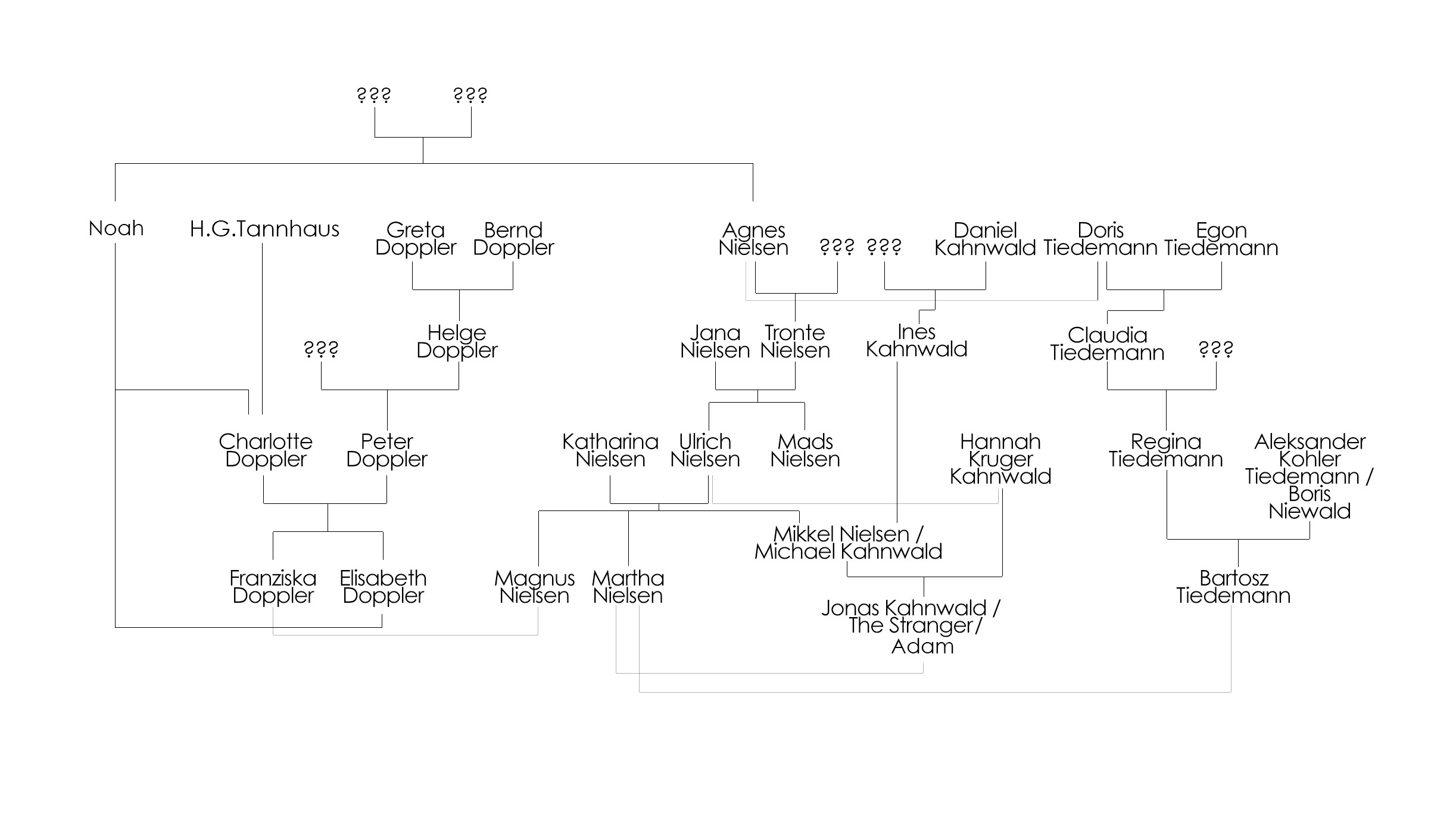 Albero Genealogico delle Famiglie nella Serie